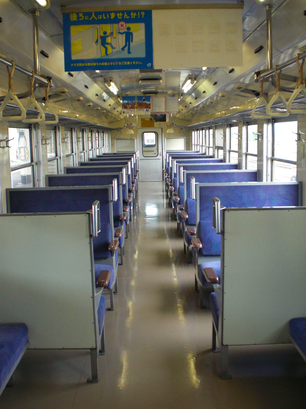 2011-09-13 小牛田駅 原形に近い車内。 冷房搭載。